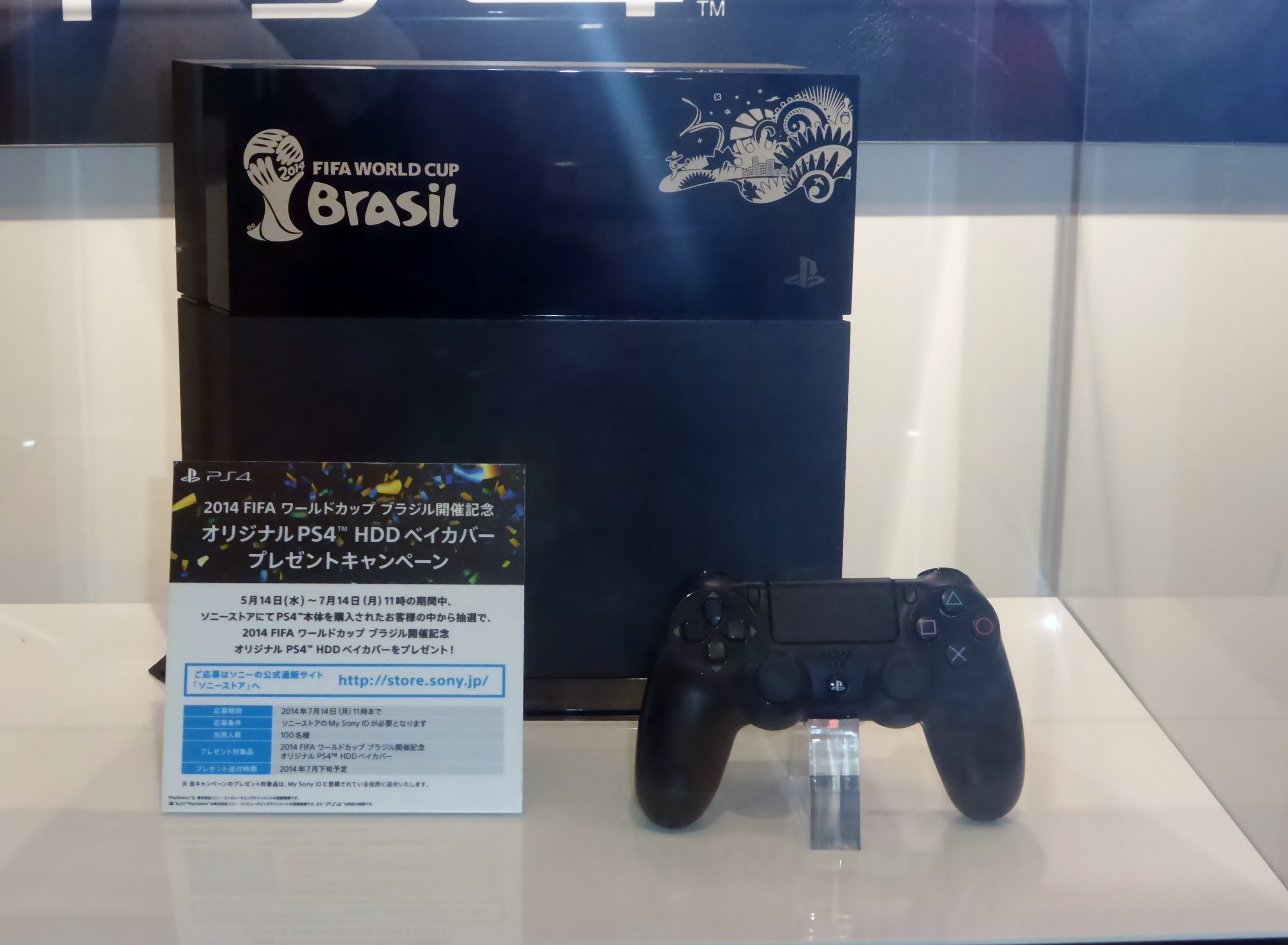 2014年FIFAワールドカップ仕様のプレイステーション4を撮影。